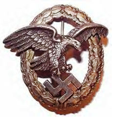 Distintivo di navigatore della Luftwaffe (Wehrmacht)